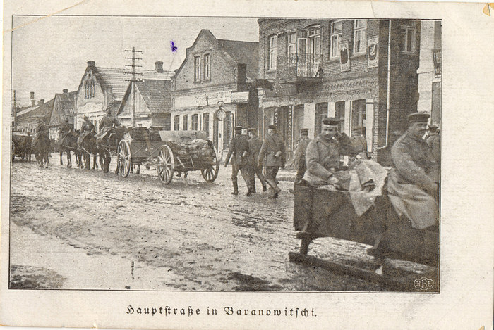 Беларуская (тарашкевіца): Паштоўка. Нямецкія жаўнеры на вуліцах Барананавіч 1917-1918 год.